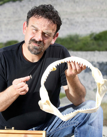 Simone Casati con una mandibola di squalo